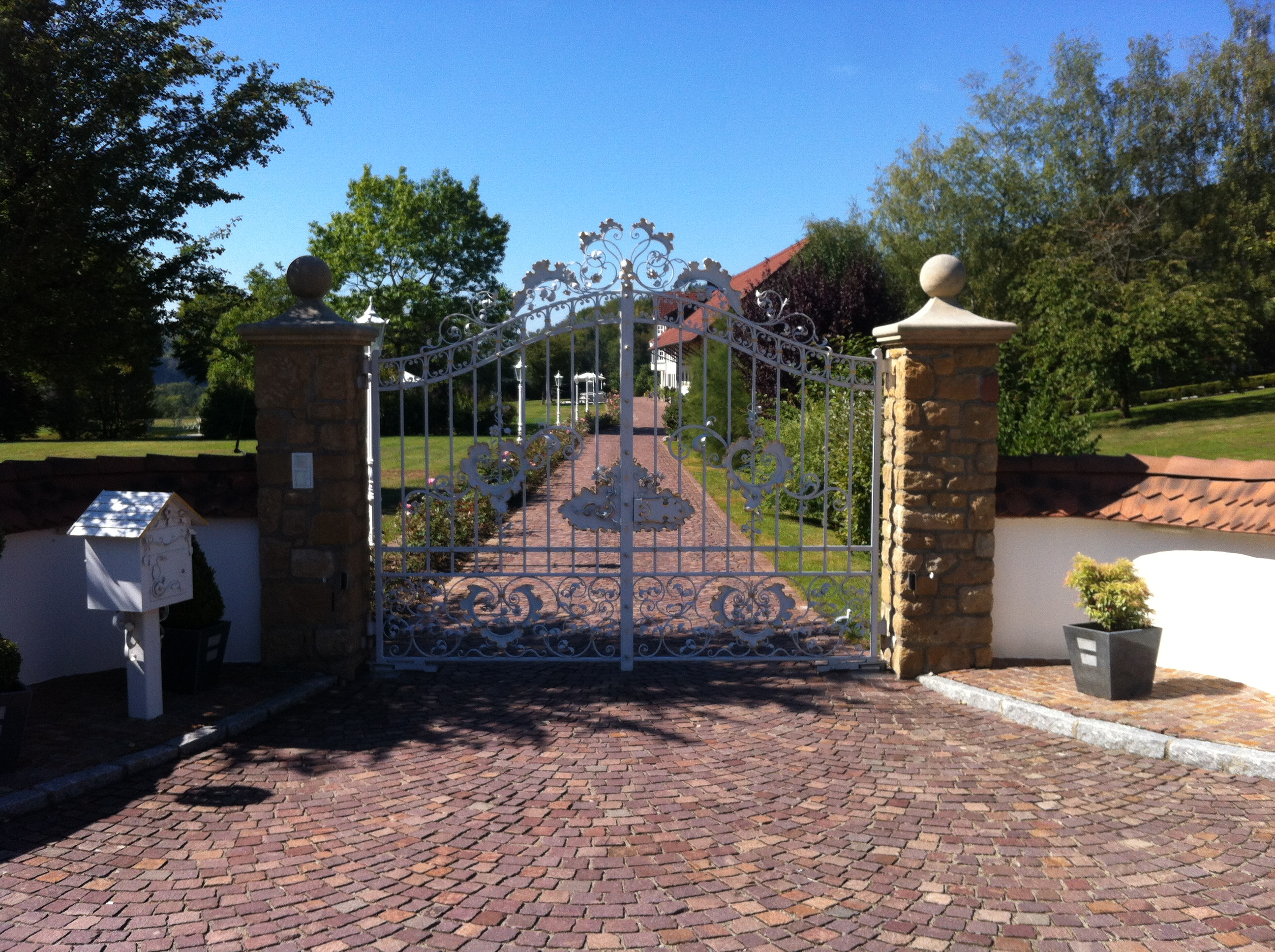 Kbg Küßnach, Ortsteil von Küssaberg im Landkreis Waldshut in Baden-Württemberg. Alkenhof